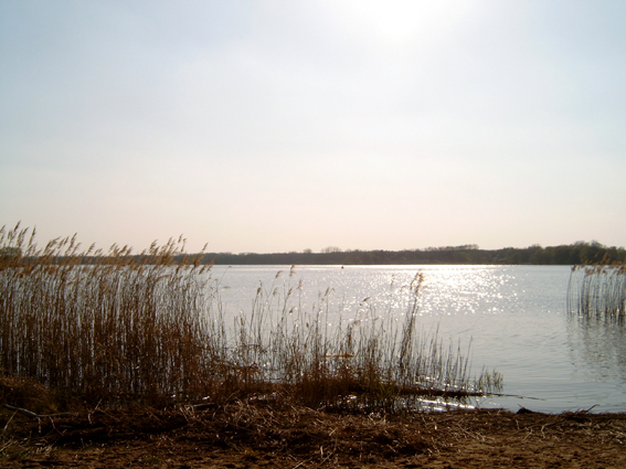 Der Wendsee vom Plauer Ufer aus